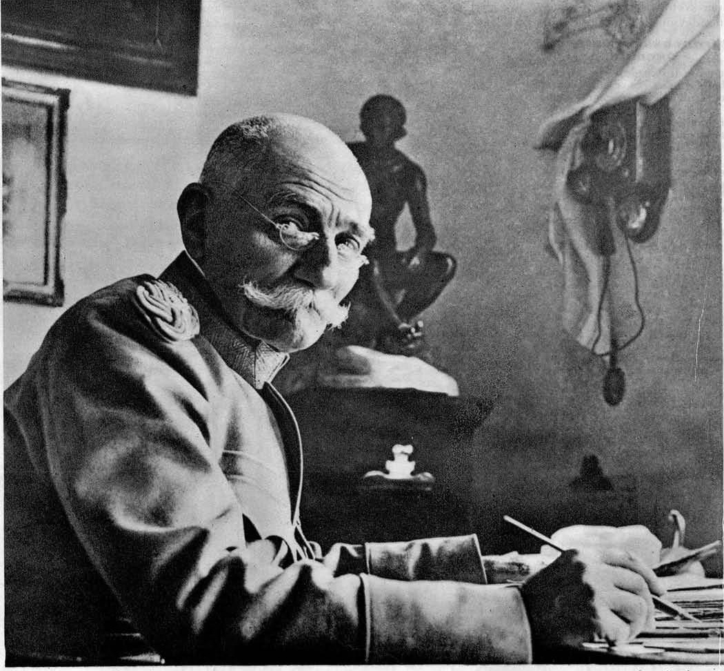 Kralj Peter I. Veliki Osvoboditelj.